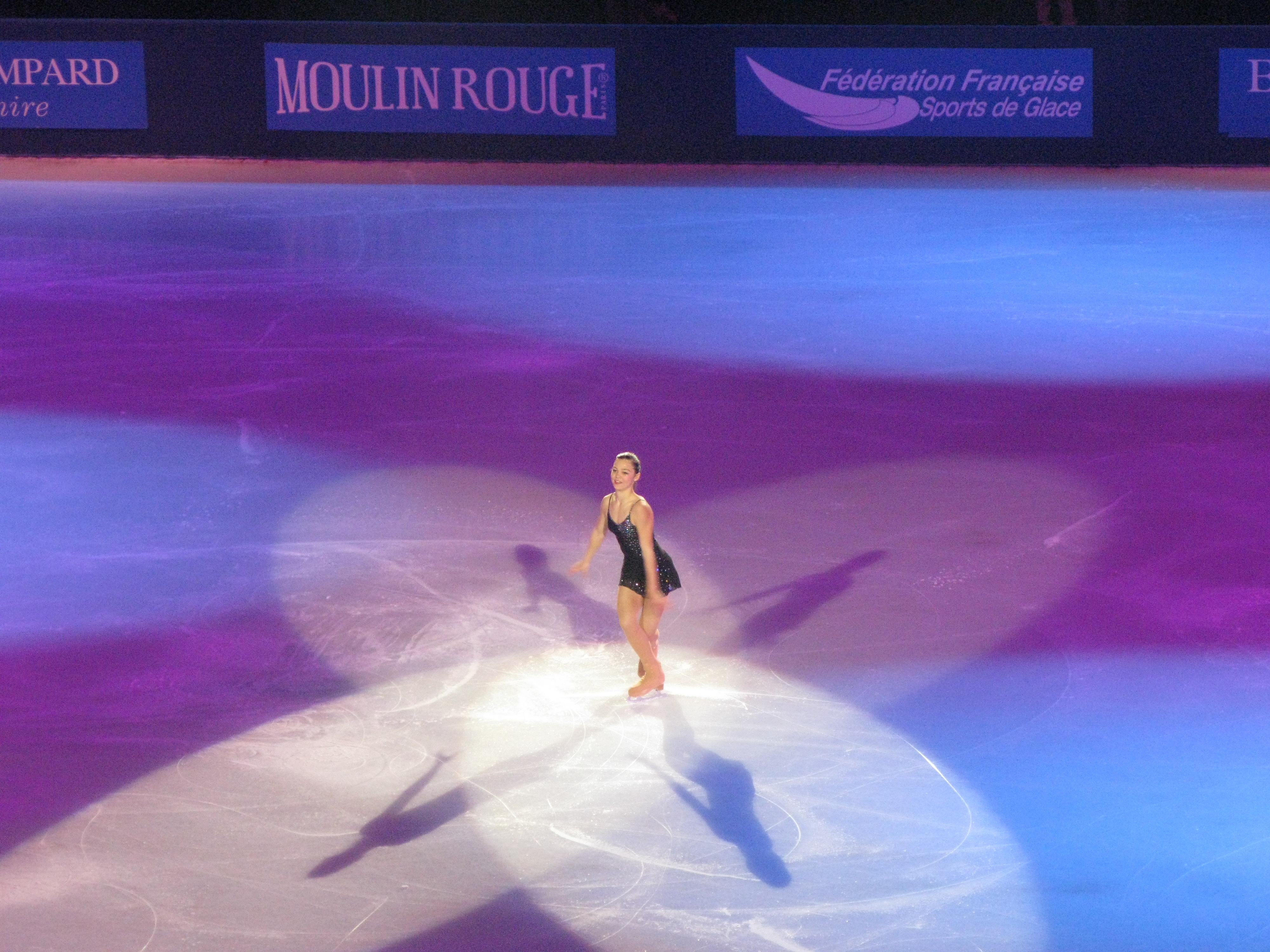 Léna Marrocco, Gala des champions, Trophée Eric Bompard 2010, Paris